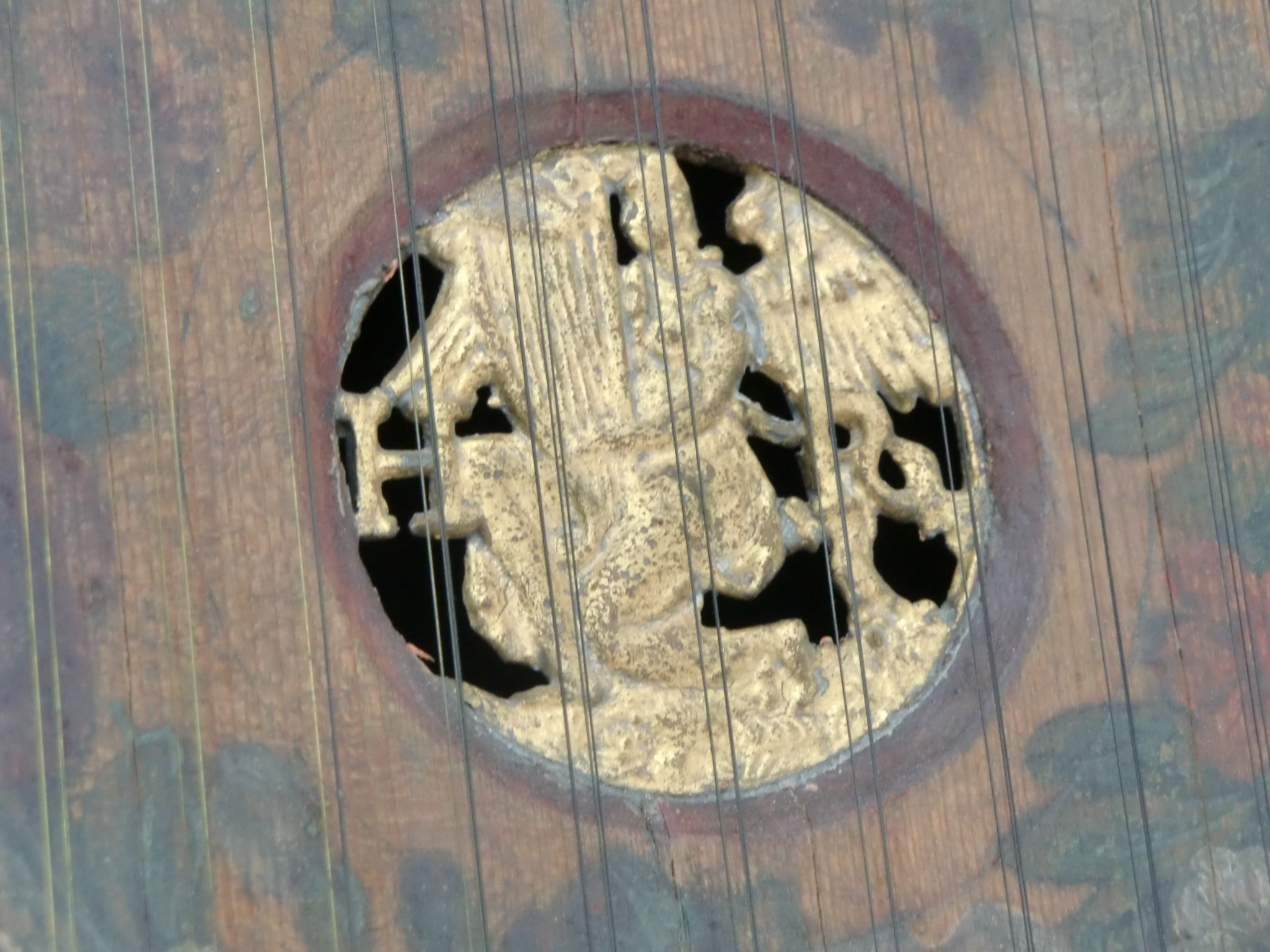 Rosace du combiné clavecin-virginal de Hans Ruckers (Anvers 1594) - Berlin, Musikinstrumentenmuseum